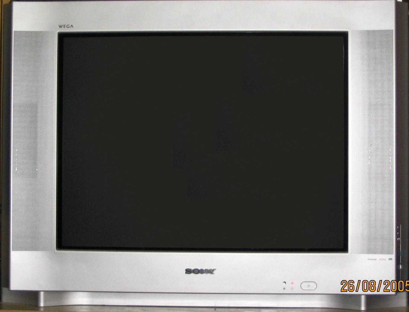 Współczesny telewizor